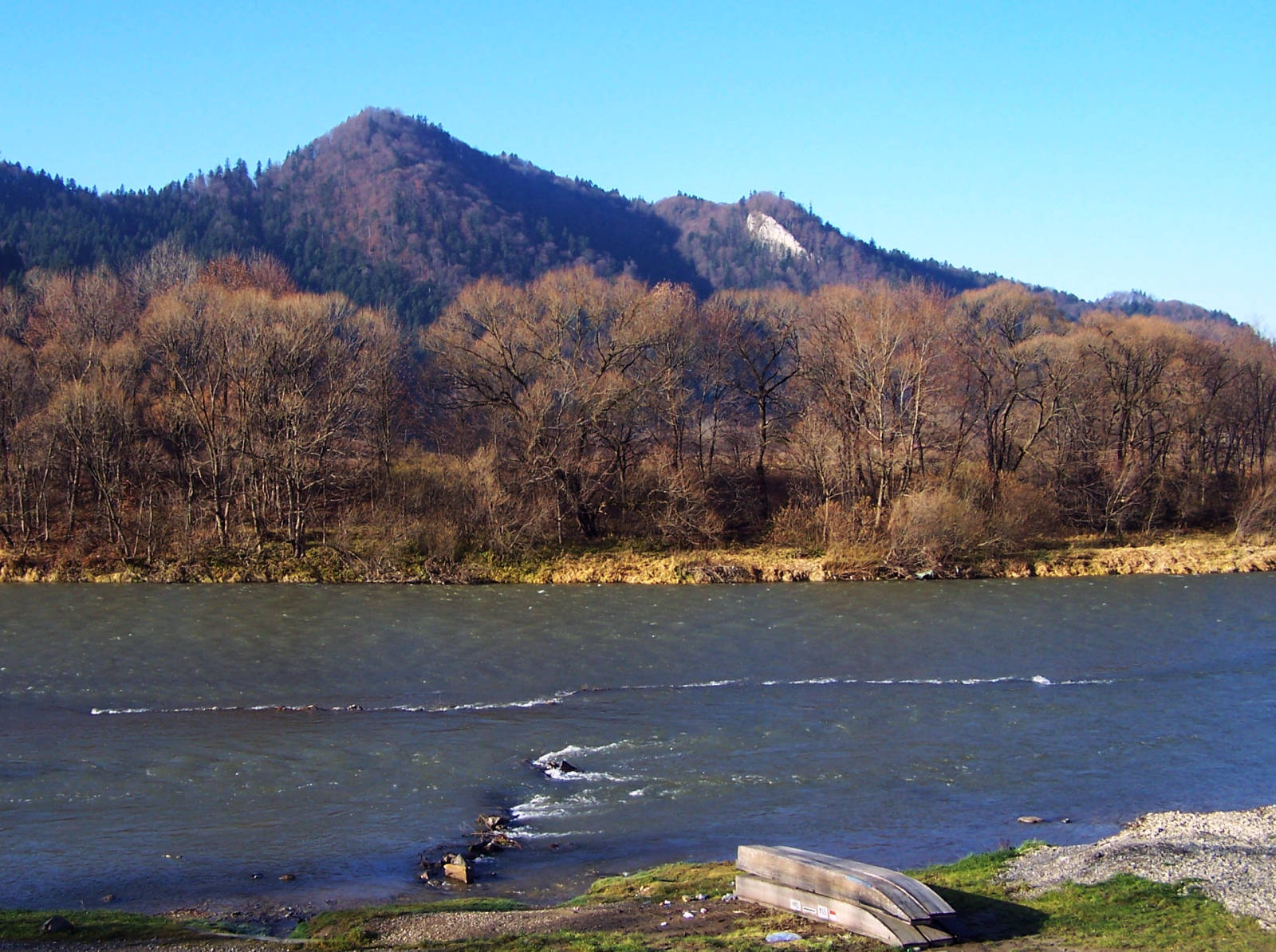 Sokolica, Czertezik (Pieniny)